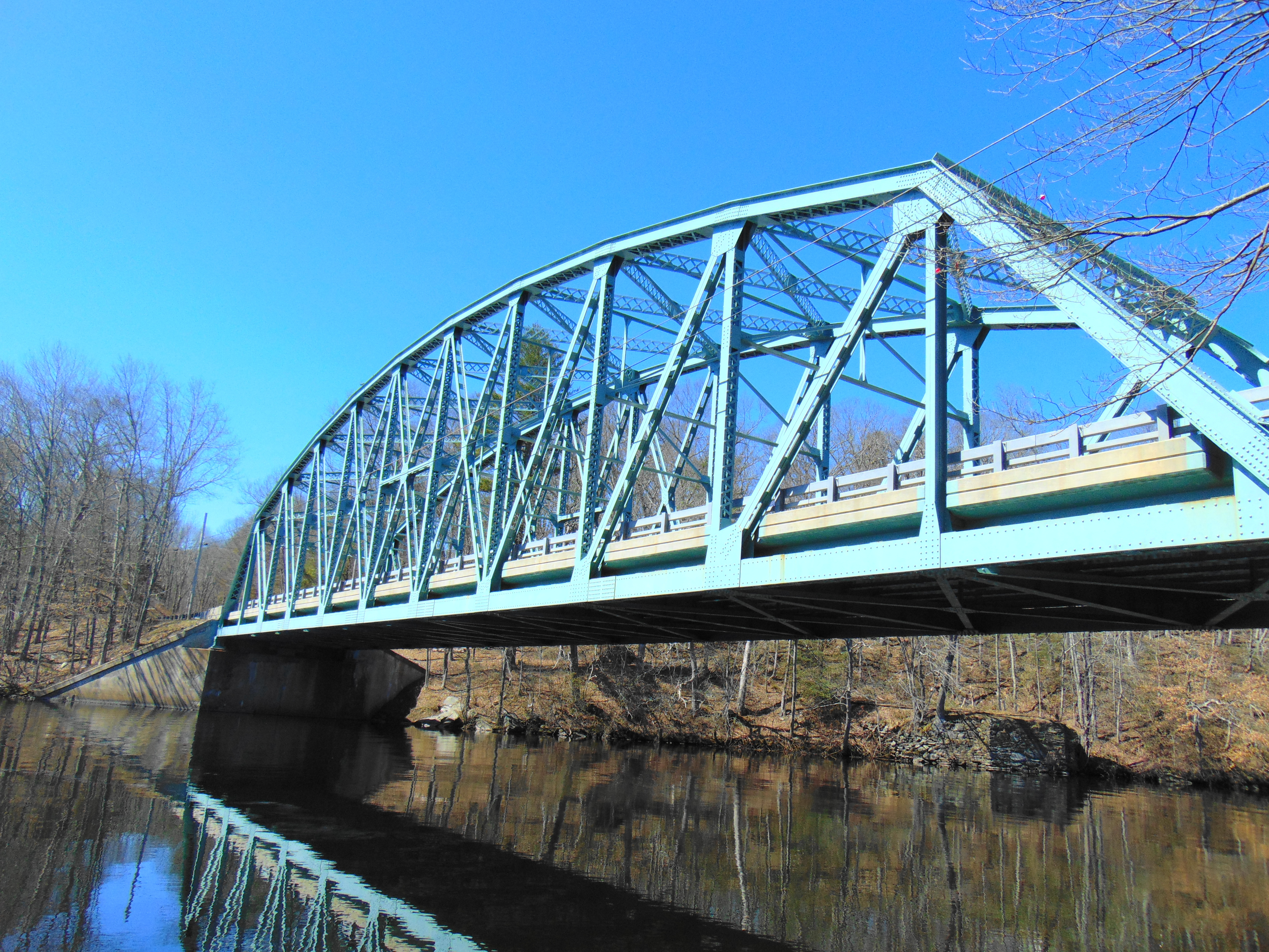 Butts Bridge over Quinebaug River.